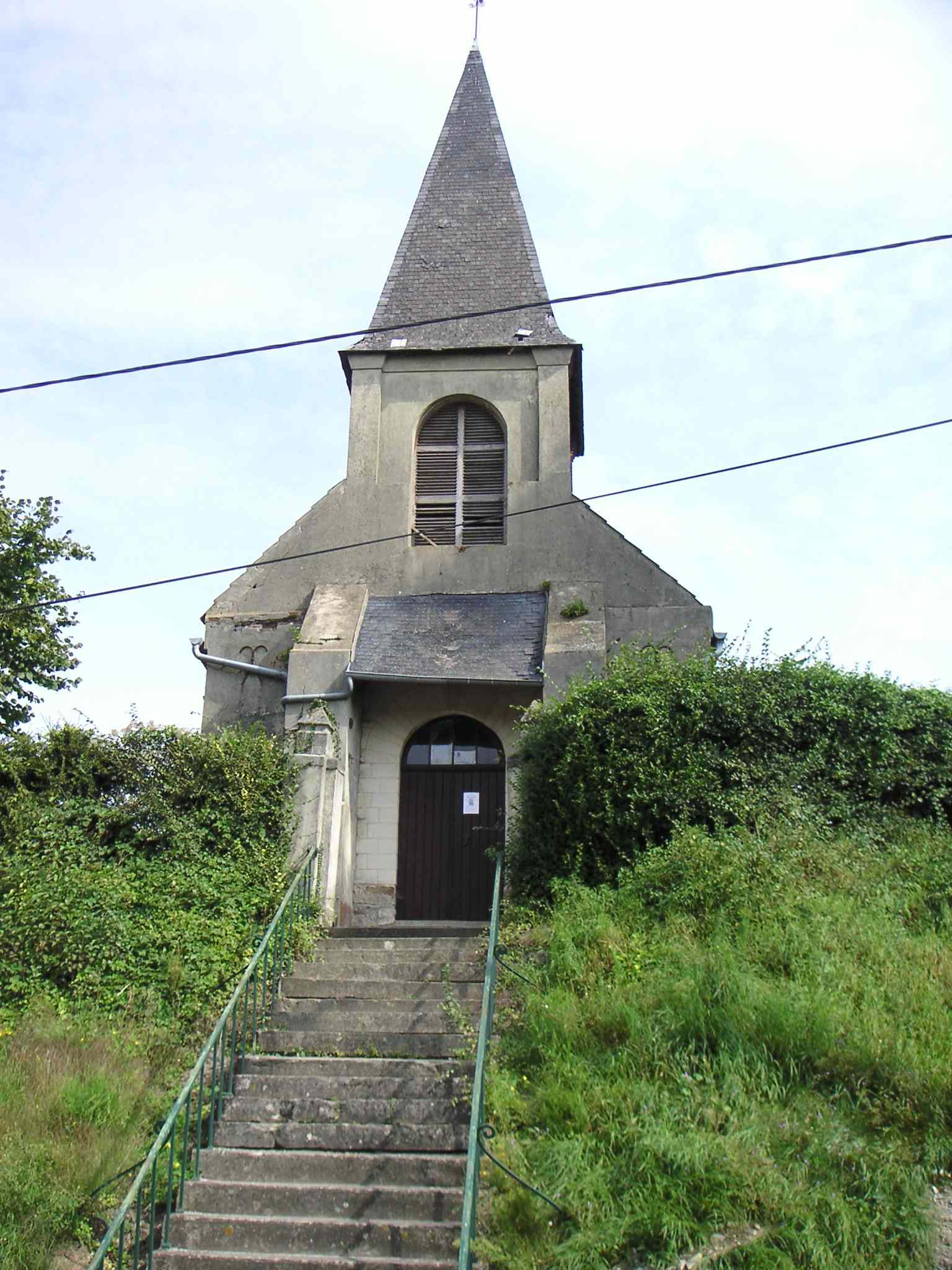 église de Proix (Aisne, France) prise par mes soins le 10/09/2005